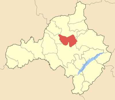 Locator map of Dimitriou Ypsilanti municipality (Δήμος Δημητρίου Υψηλάντη) at Kozani perfecture, Greece.